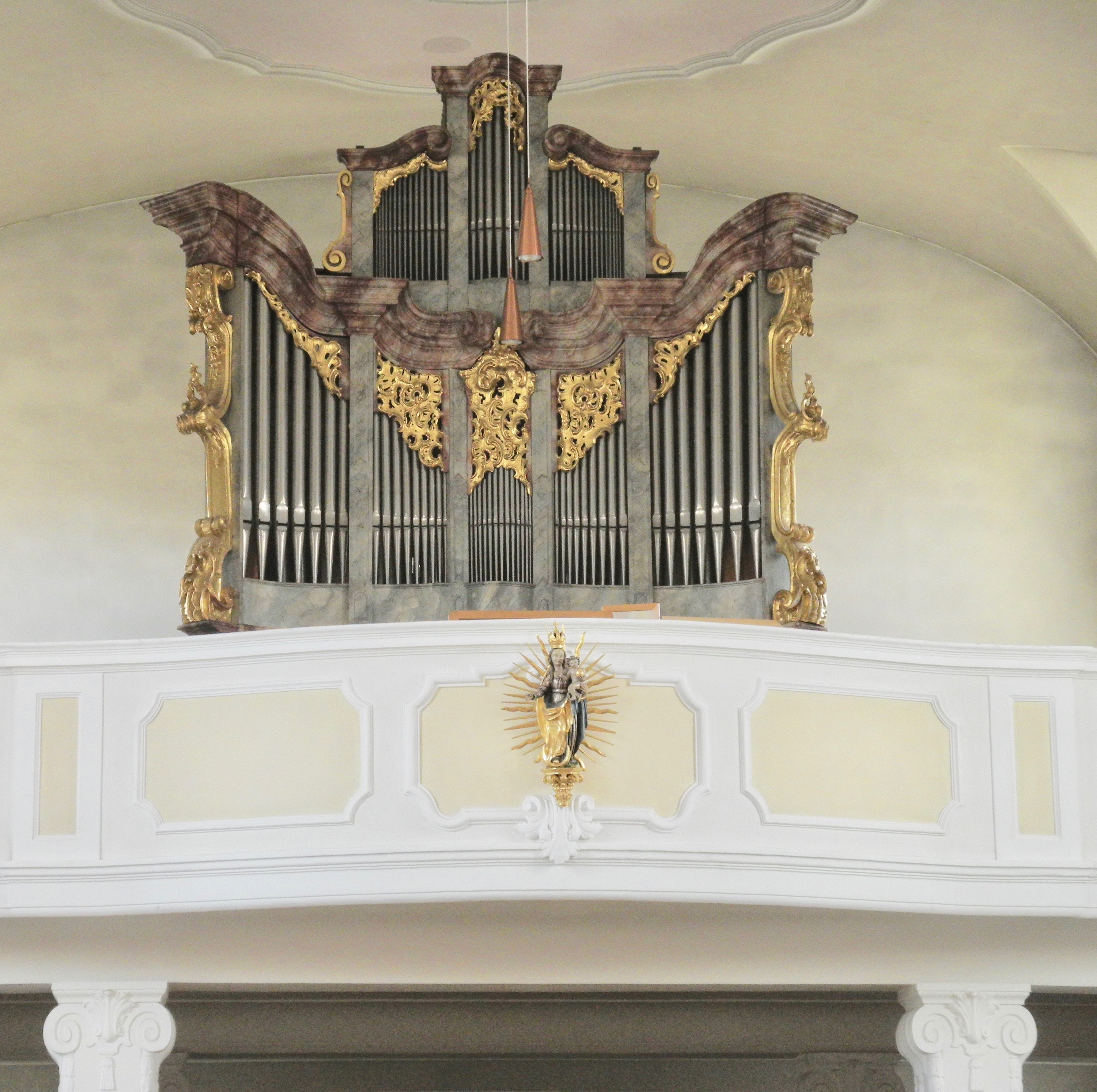 1802 aus Kemnath transferiert